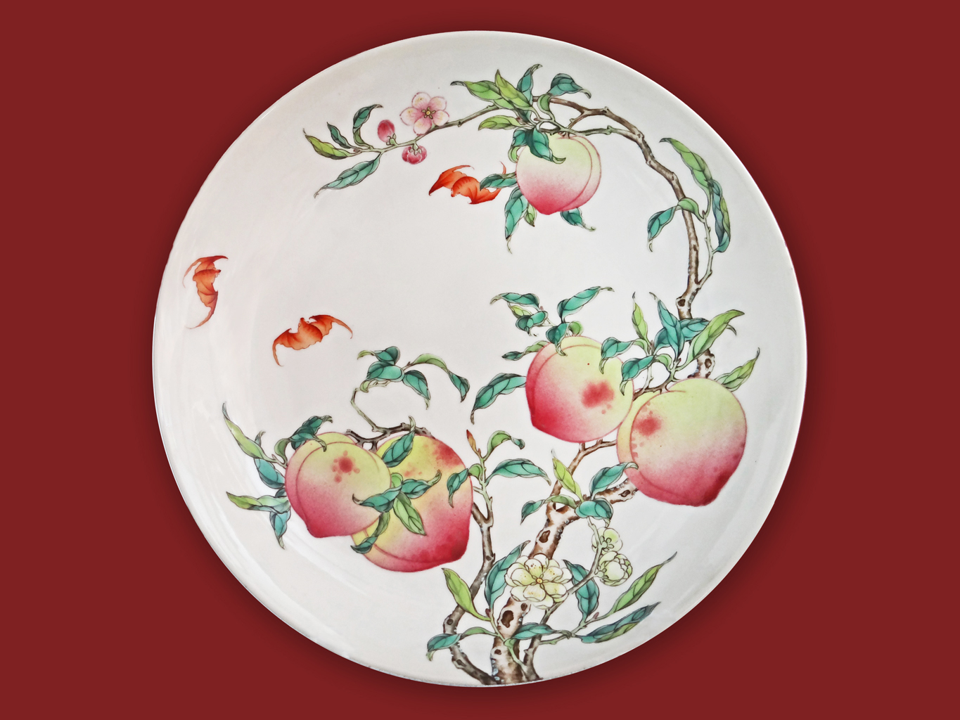 Plat à décor de pêche Chine du sud, Jiangxi Jingdezhen Dynastie Qing, période Qianlong (1736-1795) Collection Ernest Grandidier (G 608) Musée national des arts asiatiques-Guimet Le catalogue de la collection Grandidier (RMN-Guimet) Extrait de la base de la collection Grandidier Plat rond monté sur un petit pied, à paroi galbée et lèvre évasée. Décor polychrome sur fond blanc investissant librement l'espace : branches de pêcher chargées de fleurs, de feuilles et de fruits, survolées par trois chauves-souris rouges ; ce décor est repris au revers. Pièce de haute qualité. NB Le catalogue en ligne de la Collection Grandidier est remarquable au niveau scientifique par contre certaines images sous droits RMN sont d'une qualité plus que médiocre, pourquoi ne pas demander au public du musée Guimet, amateur de photographies, de contribuer à l'amélioration des outils d'information documentaire ?. On laisse bien l'accès des salles aux informaticiens de Museomix dans certains musées nationaux parisiens, pourquoi ne pas faire de même avec les photographes amateurs qui, après concertation avec les personnels du musée et peut-être sous l'égide des amis du musée, accepteraient de mettre leurs meilleurs clichés à disposition du musée sous licence CC. On pourrait par exemple organiser une séance photographique dans des conditions contrôlées afin d'éviter les reflets si préjudiciables aux photographies d'objets sous vitrine réalisées par des visiteurs.